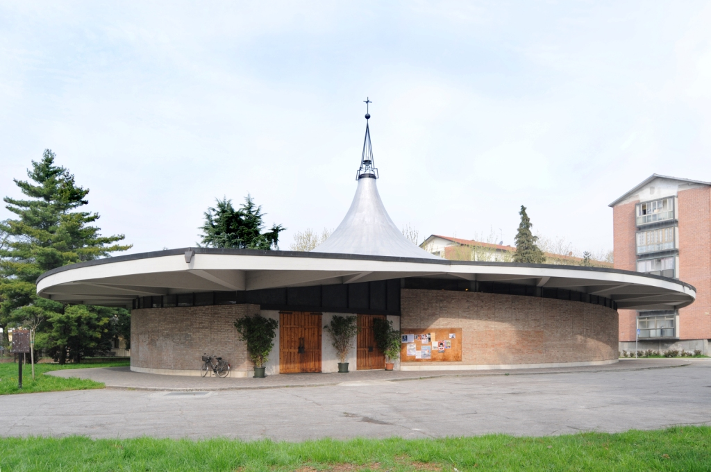 Al centro del quartiere la chiesa di san Carlo